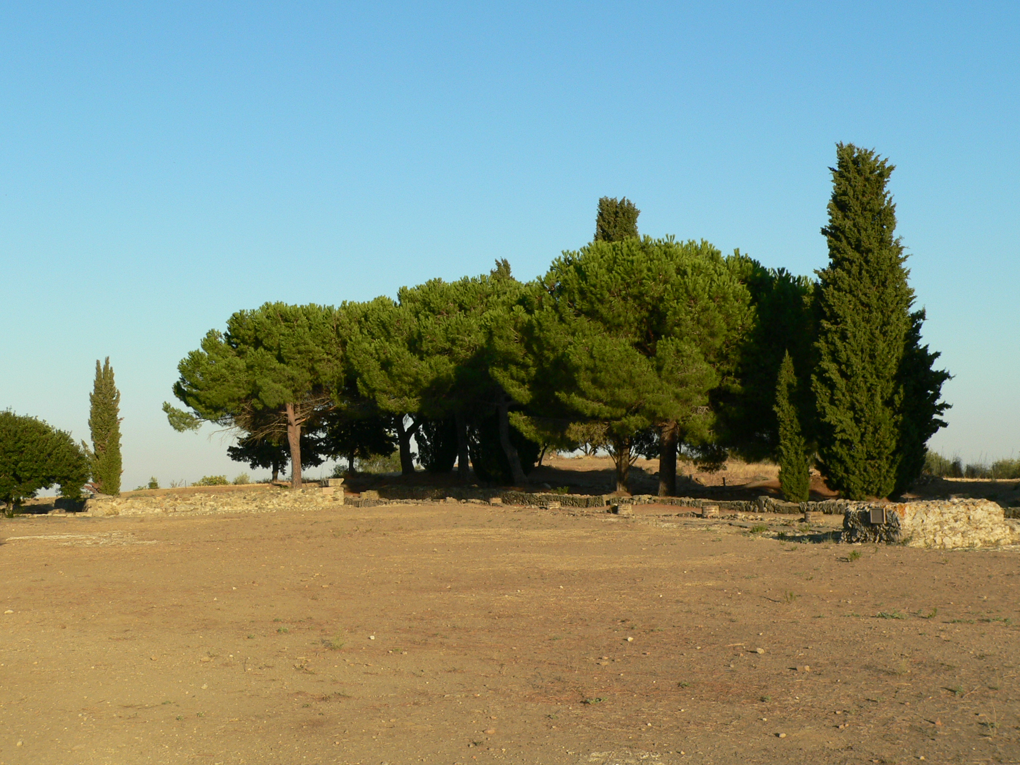 Aléria, Haute-Corse Site archéologique Le Forum